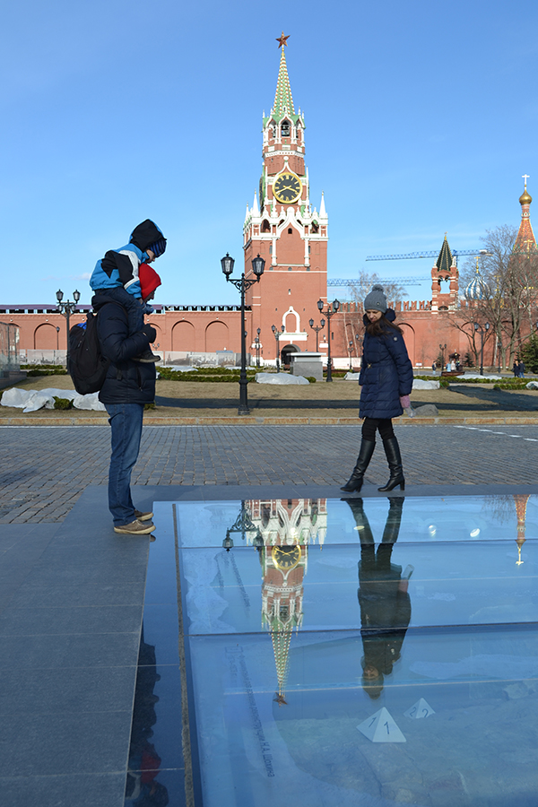 Россия. Москва. 26.03.2017. Археологические окна на территории разрушенных Малого Николаевского дворца и Чудова монастыря в Московском Кремле.